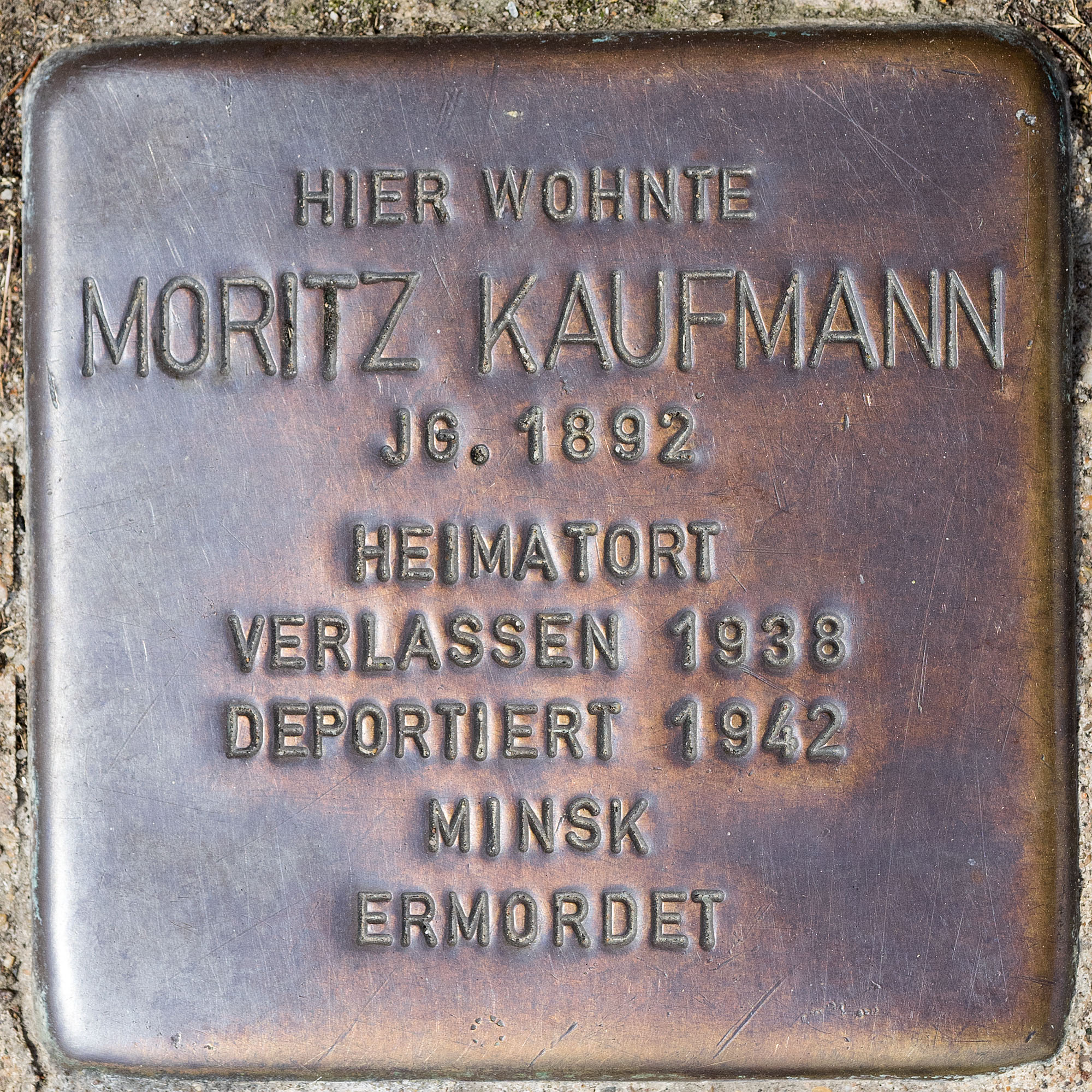 Stolpersteine Roki: Kaufmann, Moritz